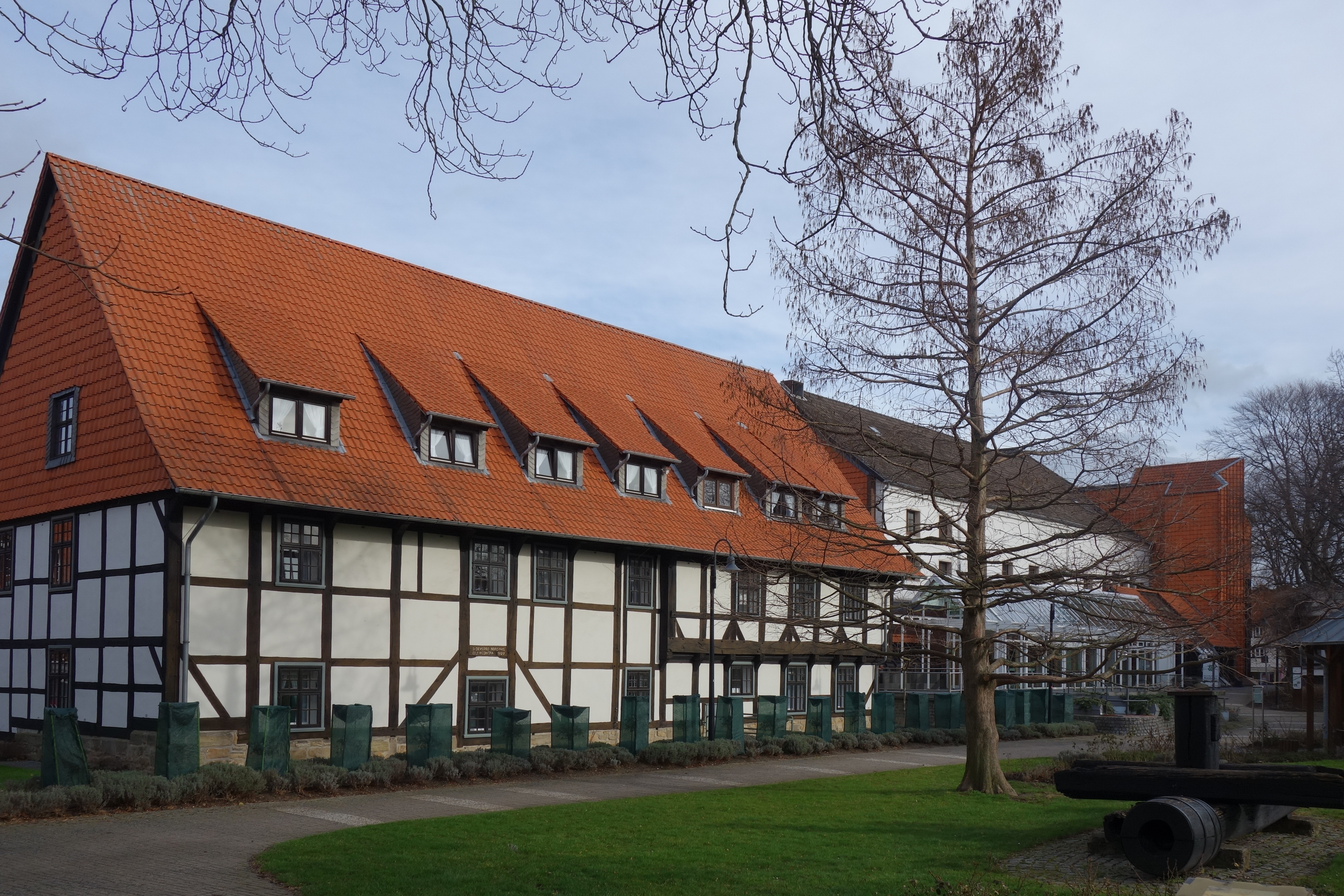 Ratskeller von Salzgitter-Bad - Südseite mit Terrasse (rechts) und dem Garßenhof (Bettenhaus des Hotels)